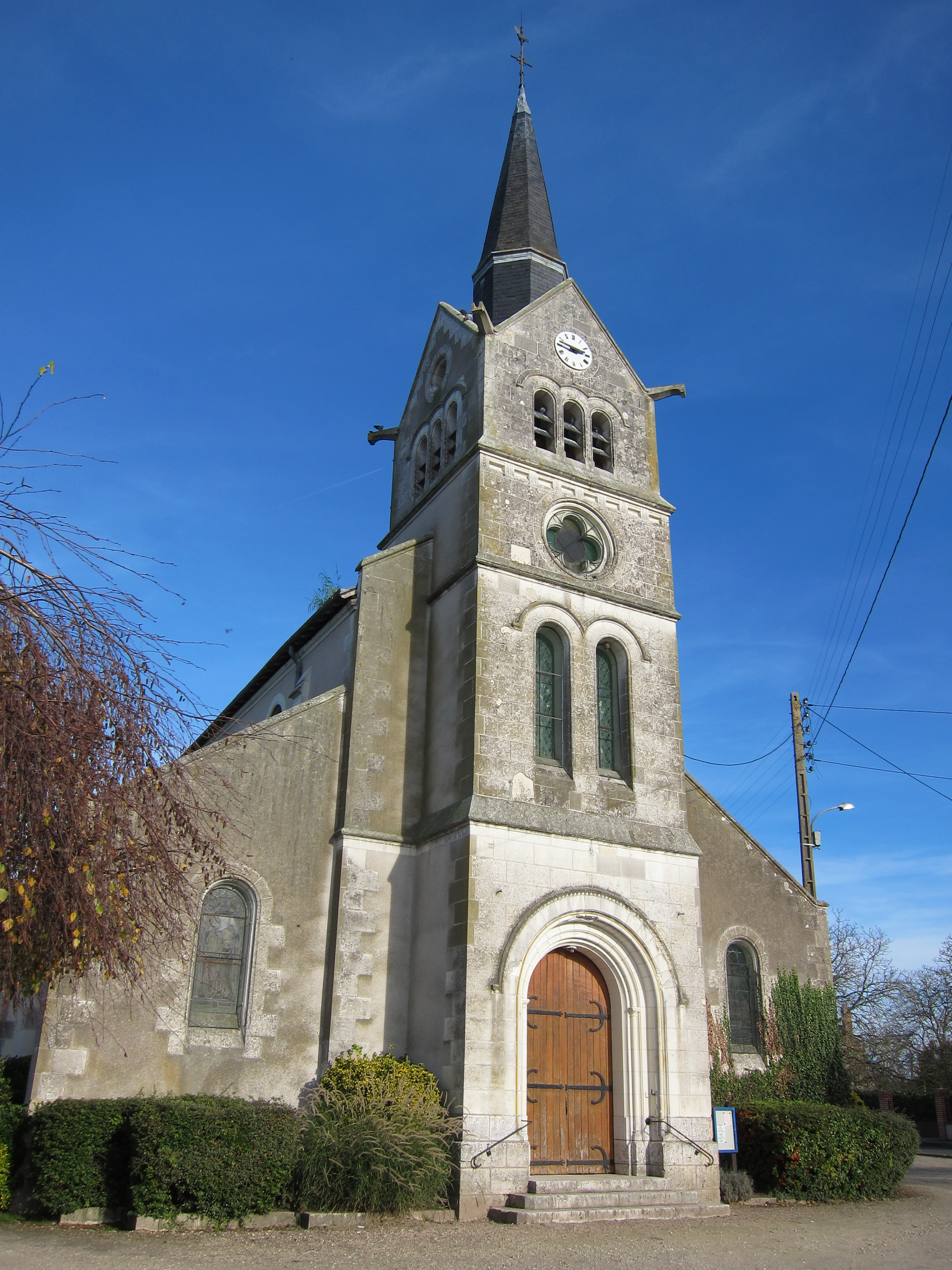 Saint Aignan, évêque d'Orléans protégea son peuple terrorisé par Attila. Construction en 1885 par l'architecte A. Lafargue de Blois. Tout le mobilier, la statuaire, les ornements remarquablement conservés et entretenus donnent une âme à ce sanctuaire.